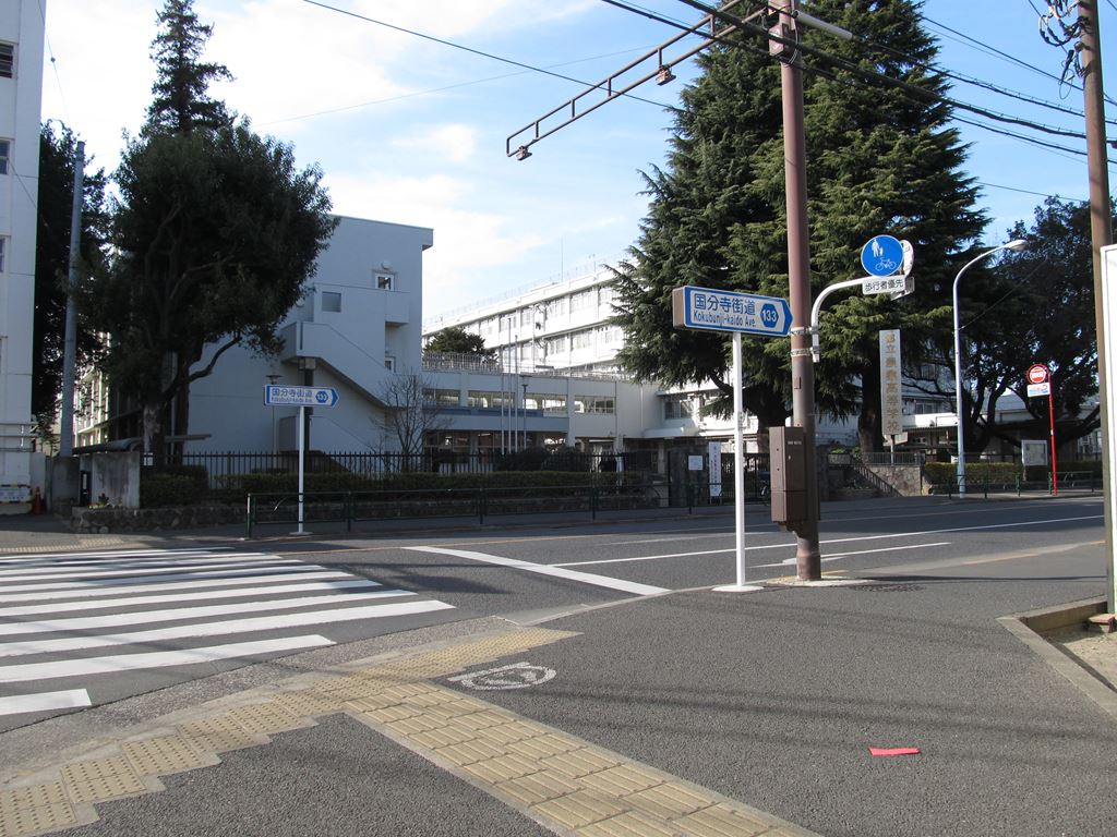 東京都道133号小川山府中線。国分寺街道。端点。寿町1丁目、東京都立農業高等学校。けやき並木北交差点。左手前はけやき並木通り。